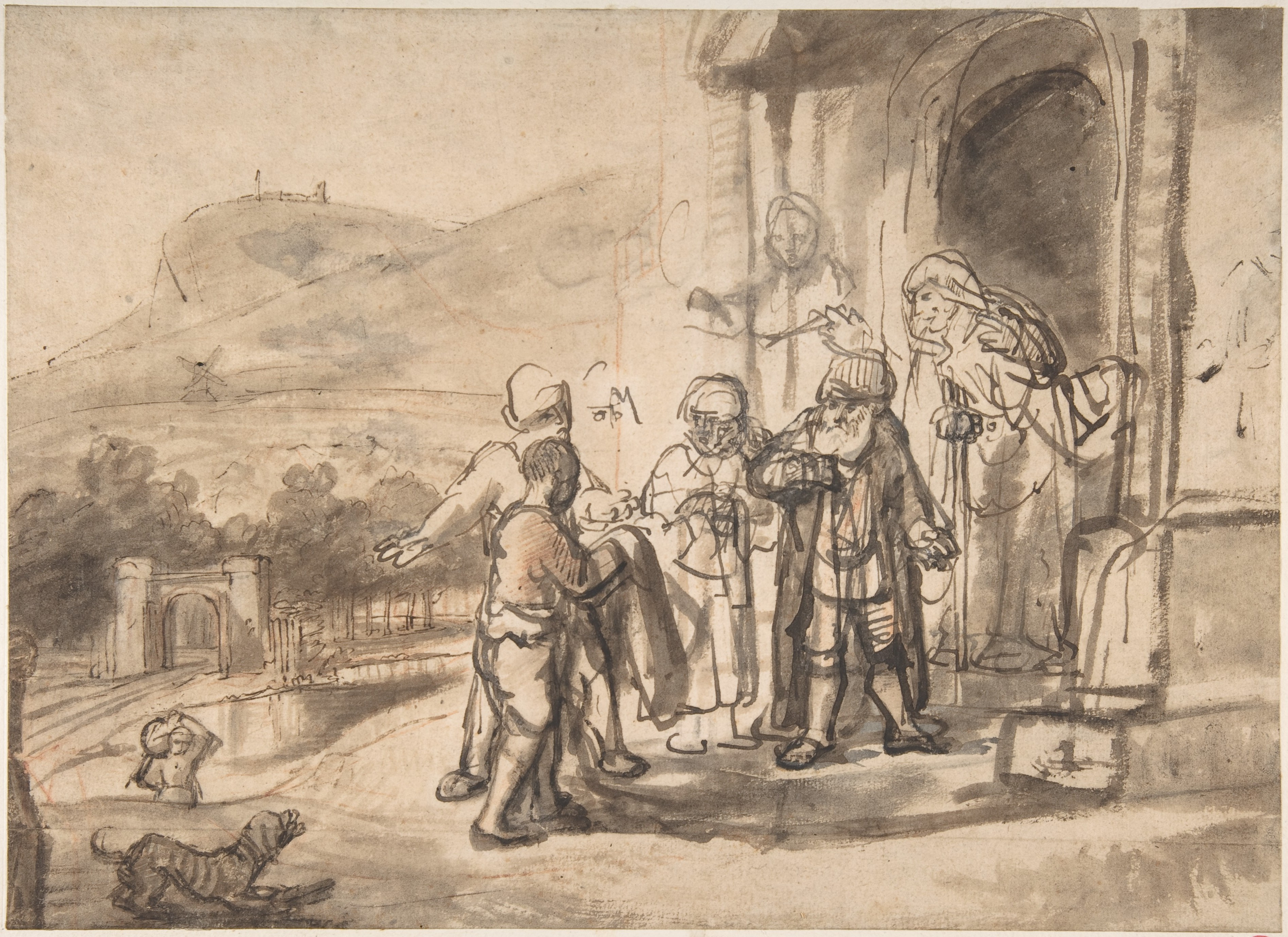 Drawing; Drawings